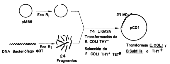 foto tomada de